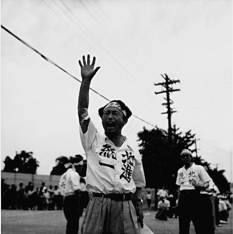 촬영일 : 1954년 04월 26일 촬영장소 : 대한민국 서울 중앙청 참석자 : 미상 관련내용 : 북진통일 궐기대회에서 한 남성이 울부짖고 있다.